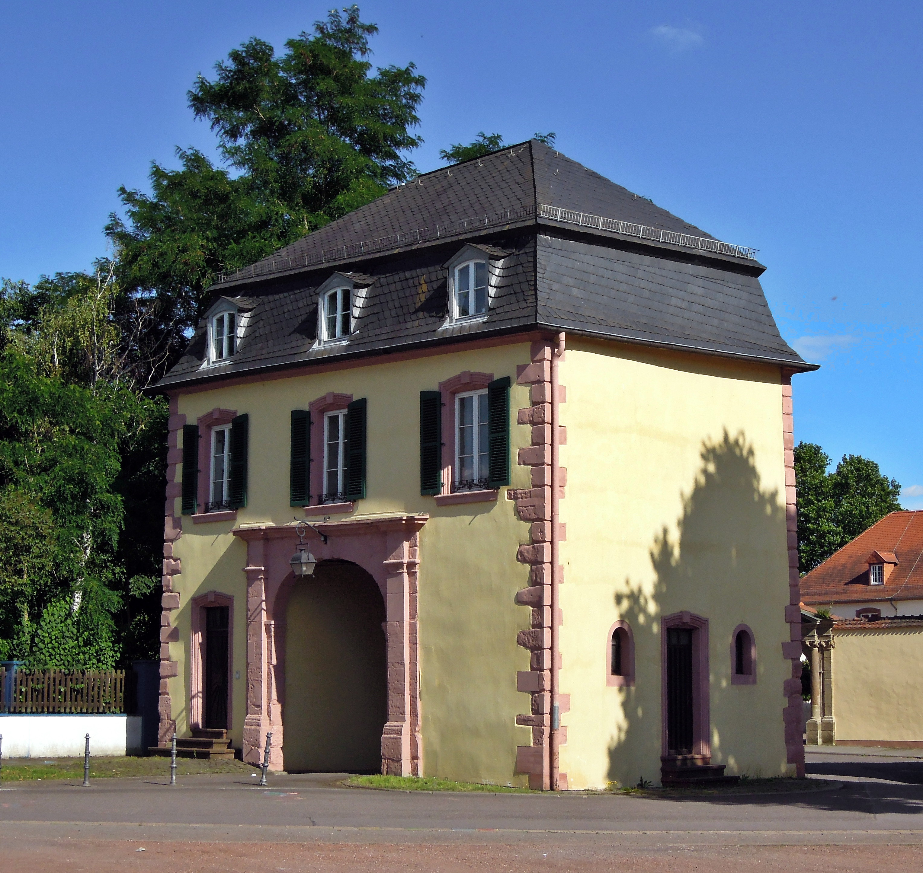 Augustinerinnen-Kloster